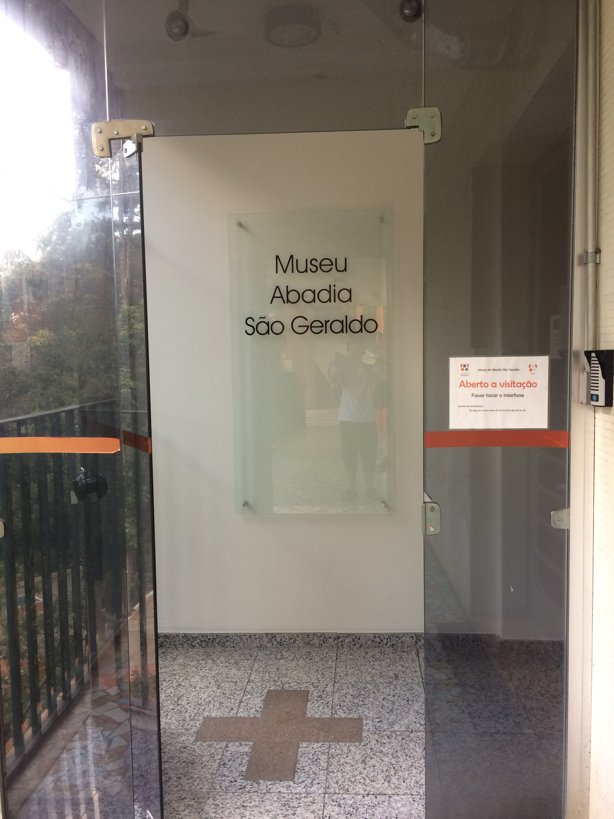 porta de entrada do Museu da Abadia São Geraldo